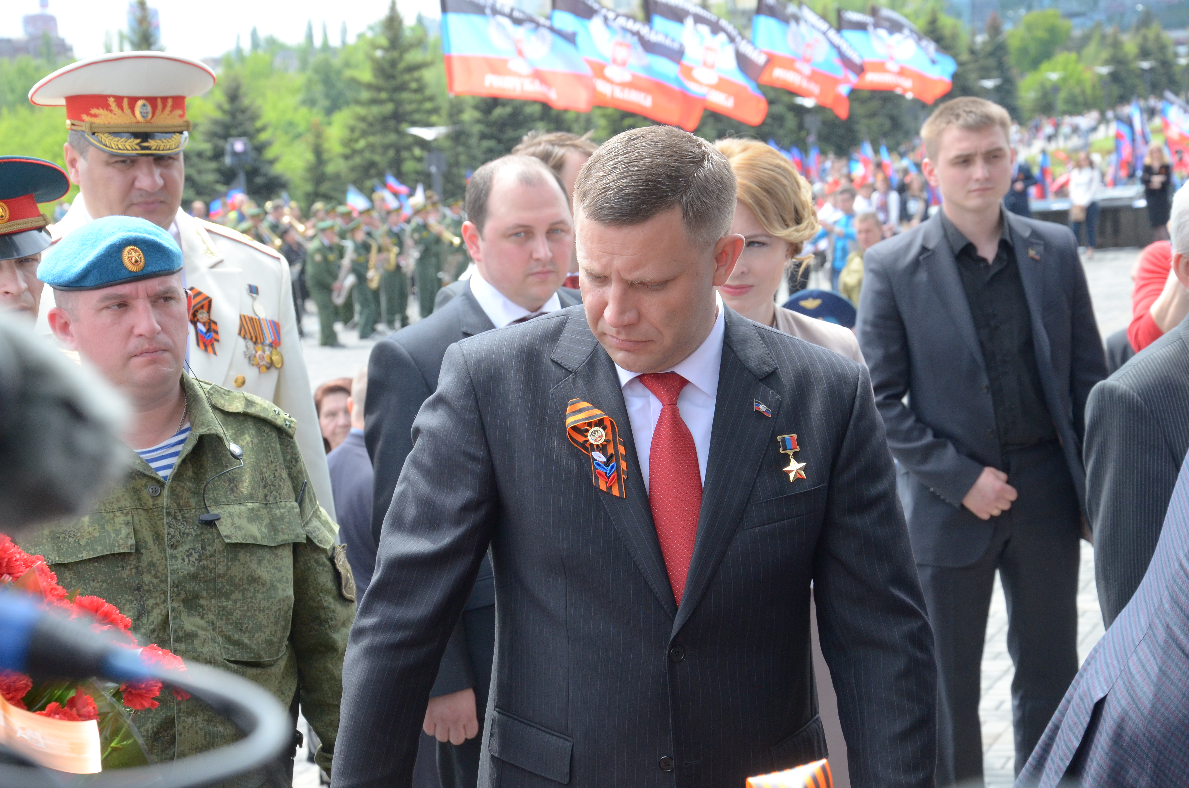 День Победы в Донецке